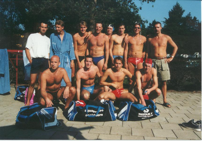 Eigen foto uit prive collectie